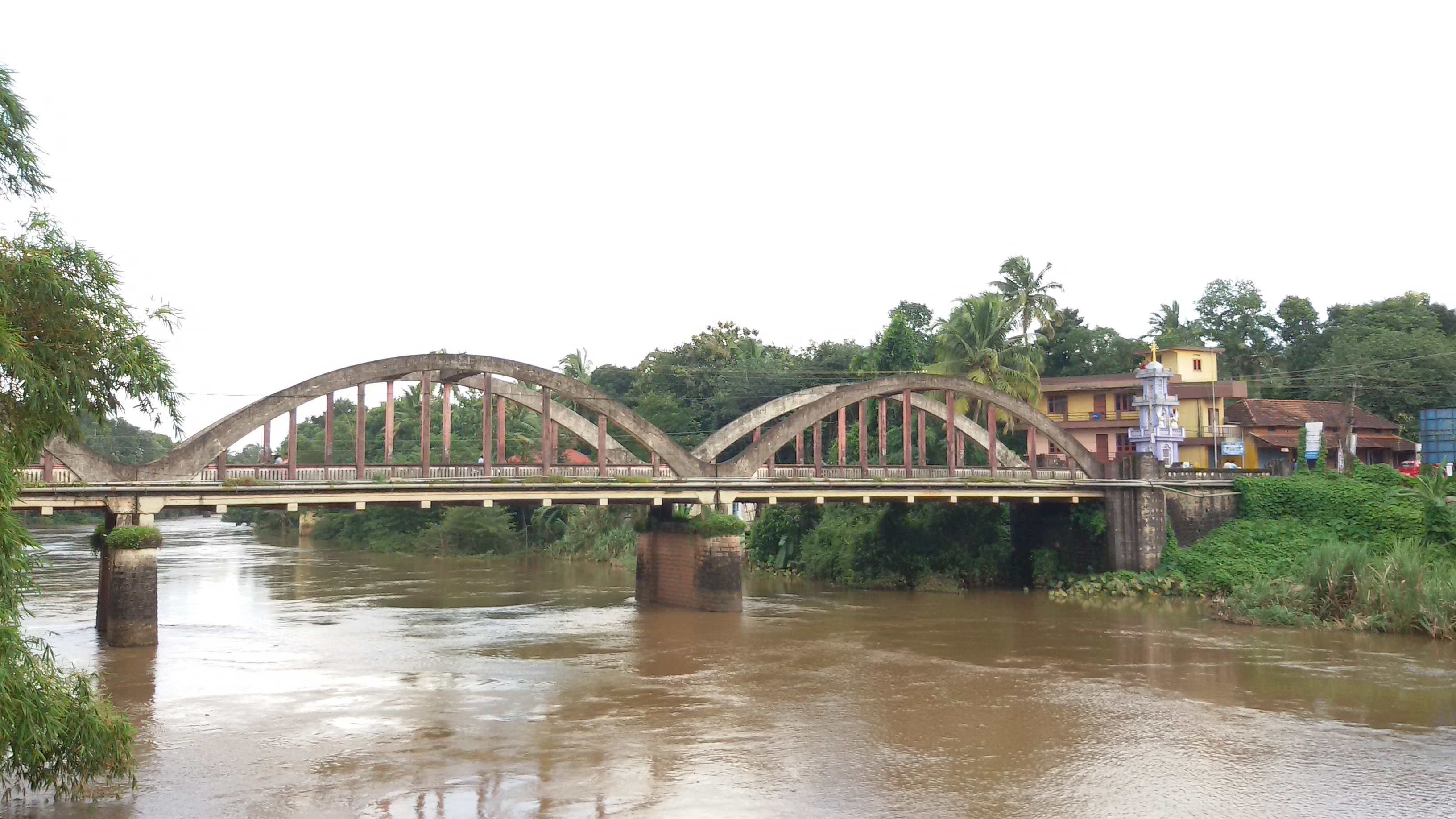 കൊല്ലകടവ് പാലം